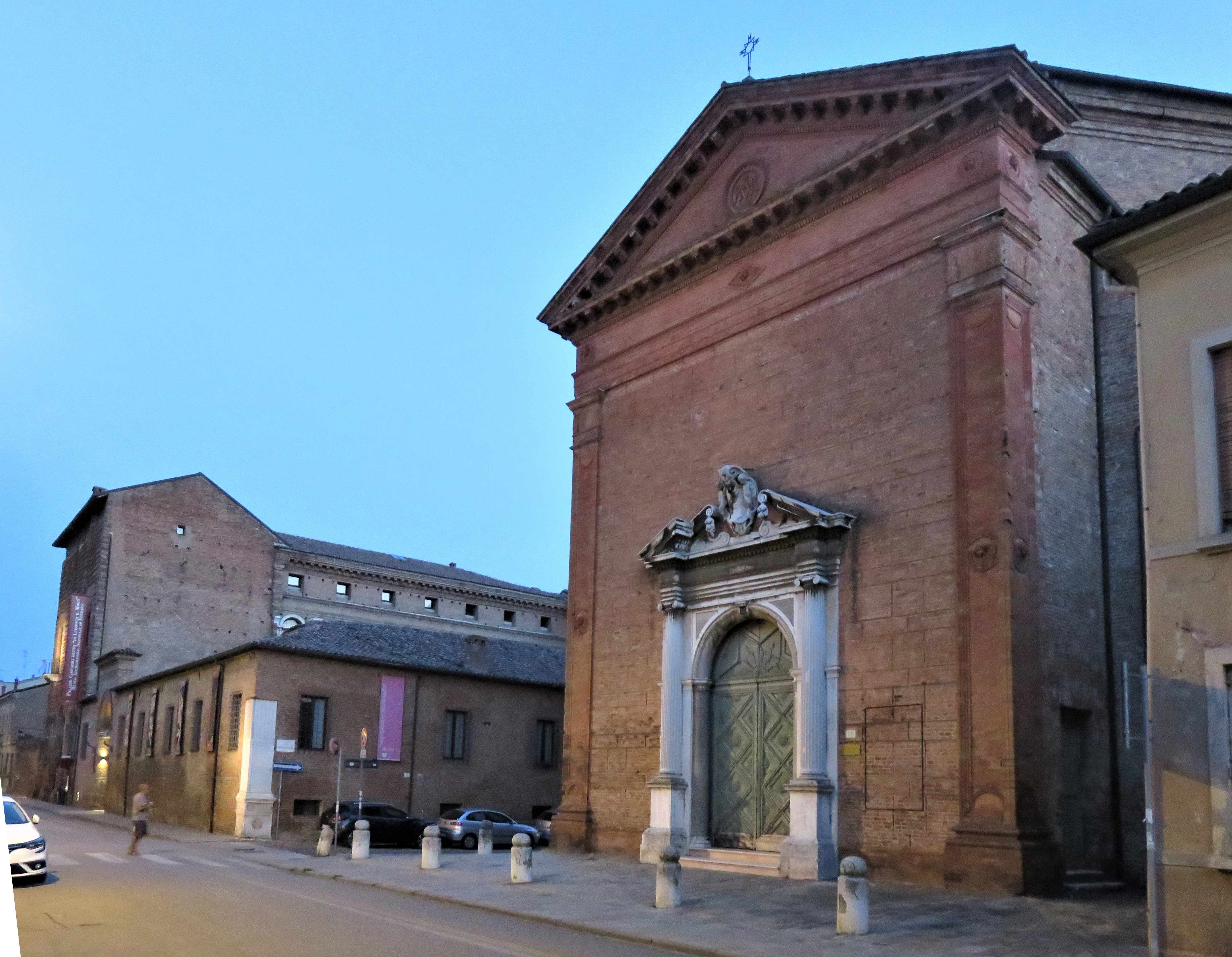 facciata chiesa via Porta d'Amore col museo archeologico nazionale